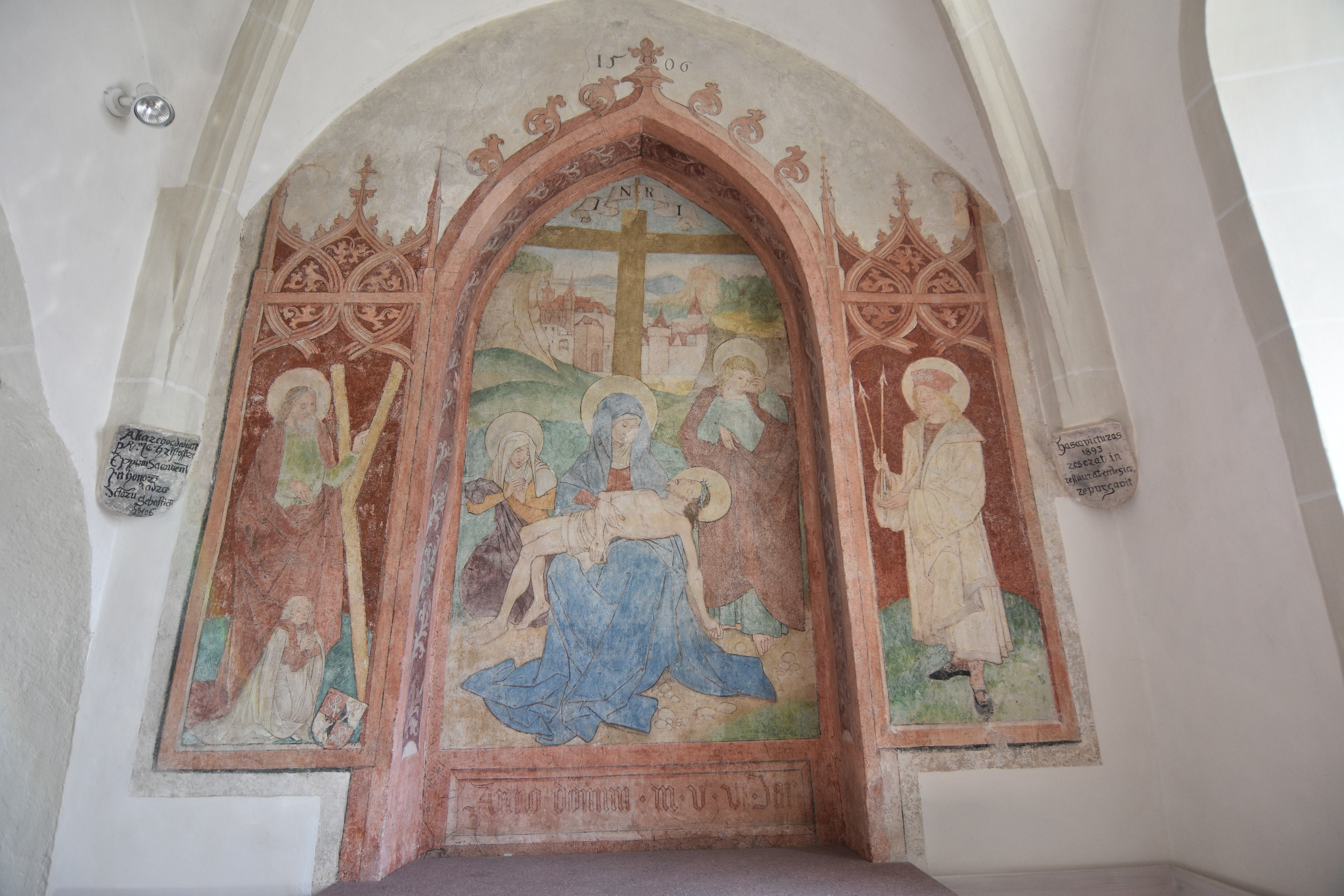 Pfarrkirche St. Radegundis, St. Radegund bei Graz - Interior